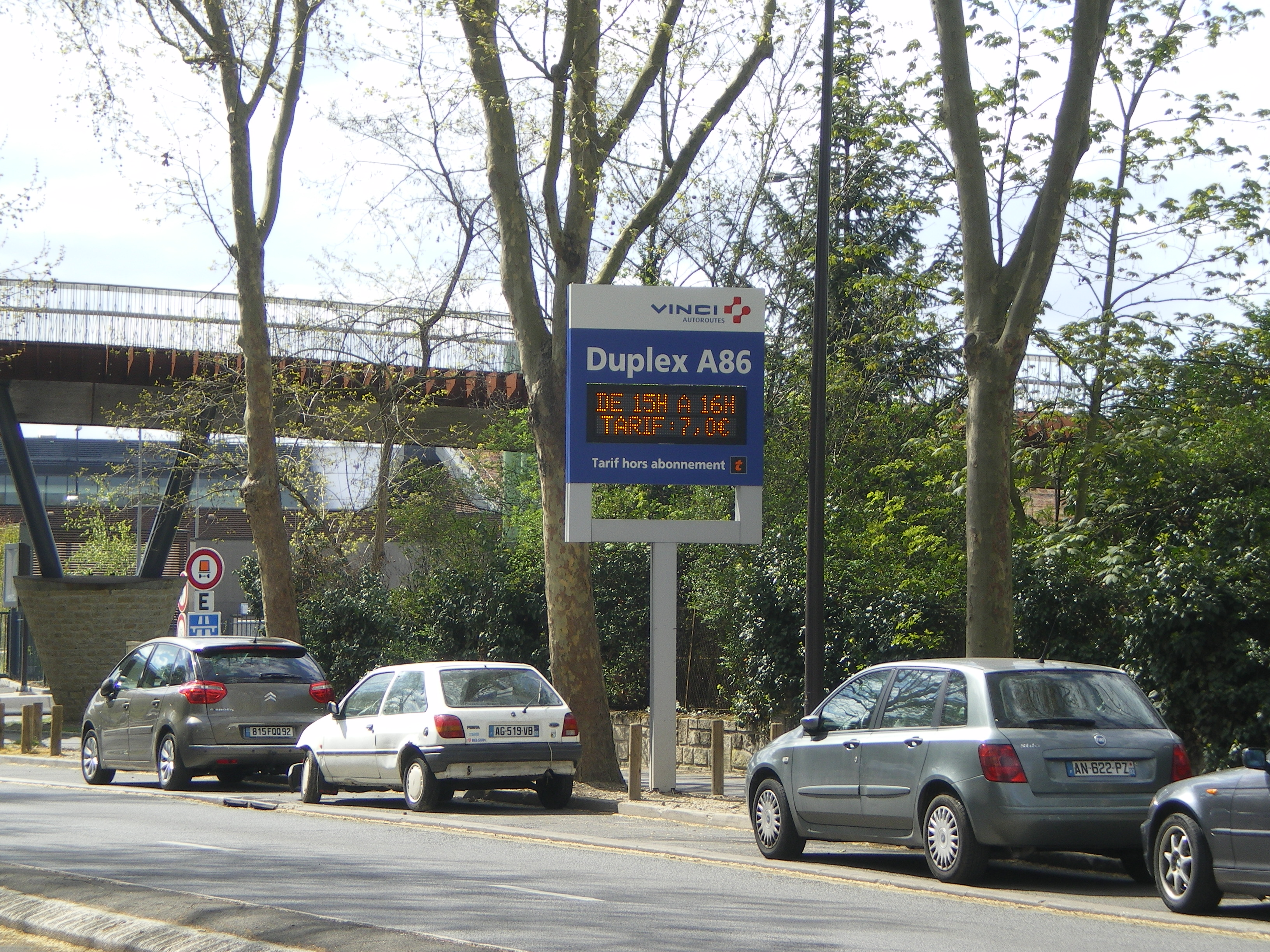 Un panneau d'informations annoncant le tarif du peage du duplex A86. Le tarif est module en fonction de l'heure